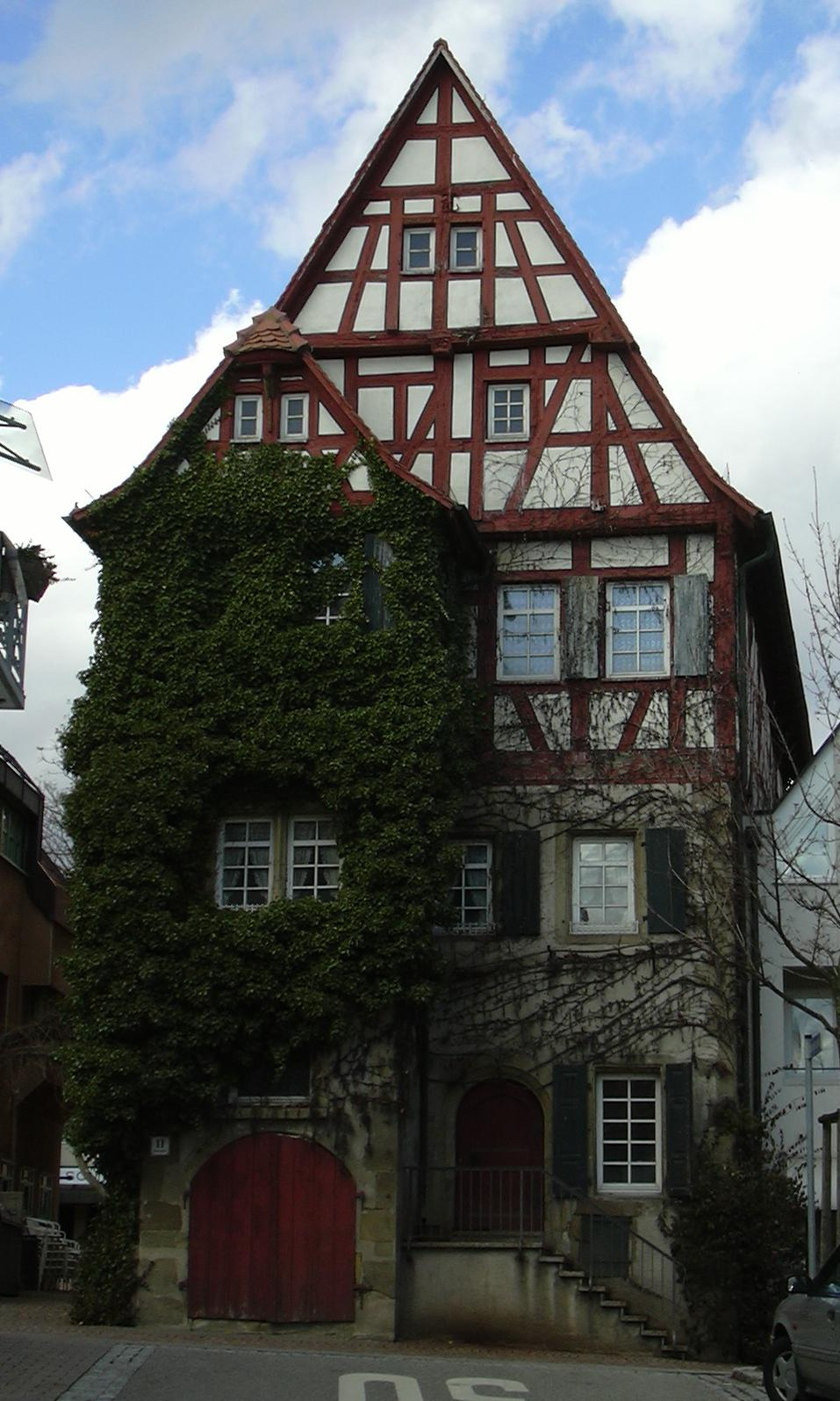 "Steinhaus" in Güglingen